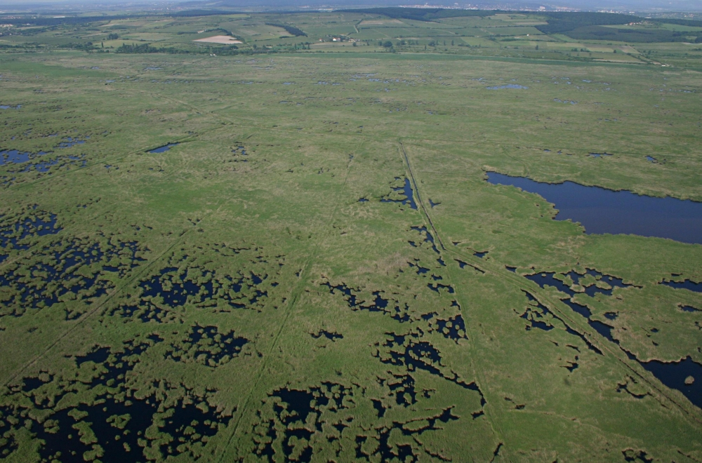 A Fertő nádasa és a balfi dombok (Balf - Fertőrákos)